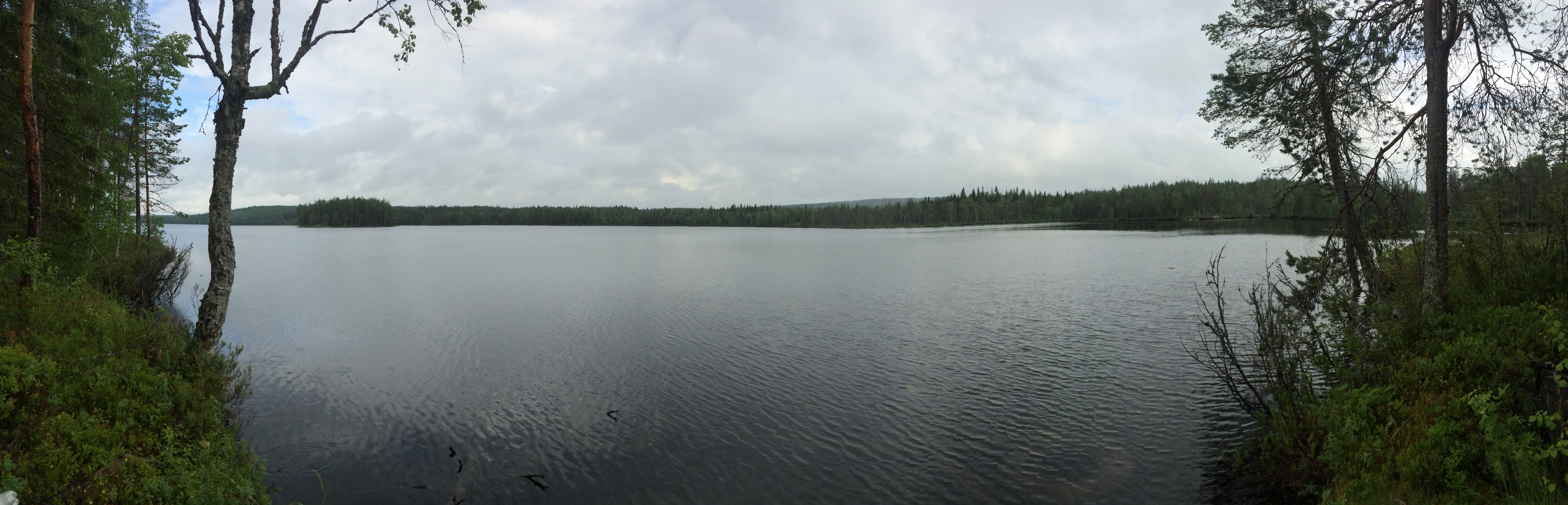 Большие Кушкари